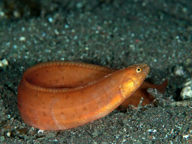 ギンポ Enedrias nebulosa = Pholis crassispina